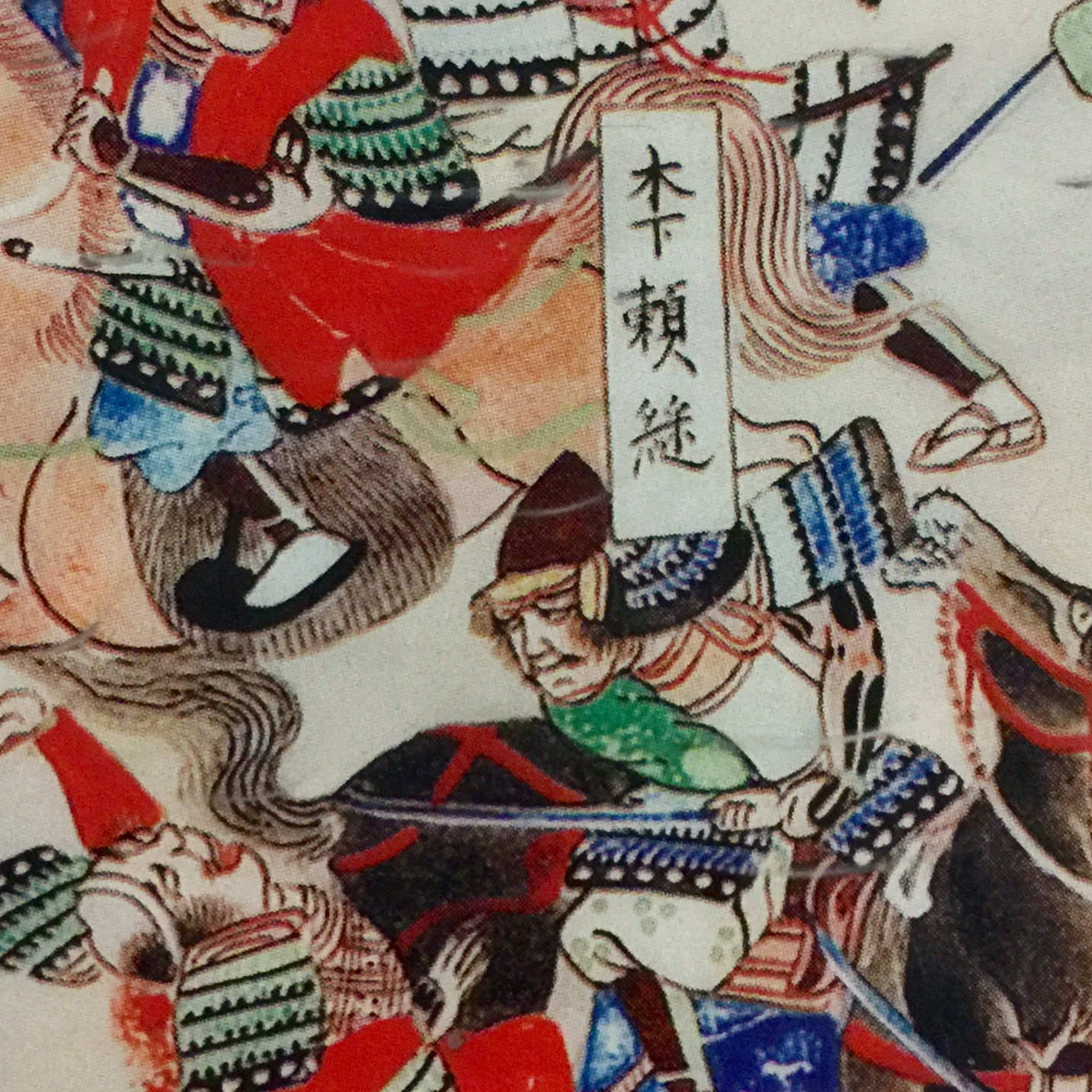 関ヶ原合戦図屏風（関ケ原町歴史民俗資料館本）に描かれた、大谷家家臣の木下頼継。